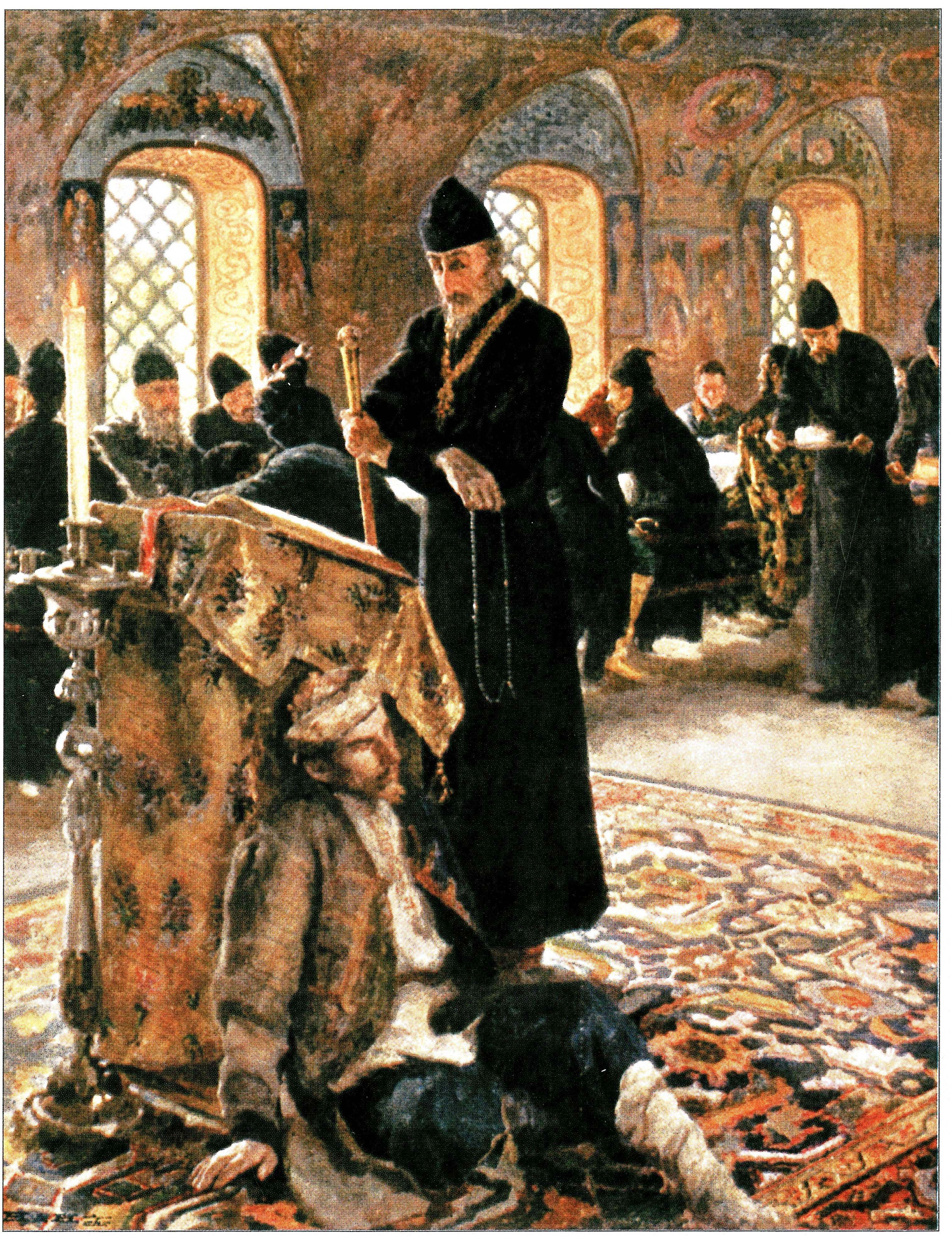 "Иоанн Грозный в Александровой слободе". Открытое письмо Российской Империи. 1905 год.